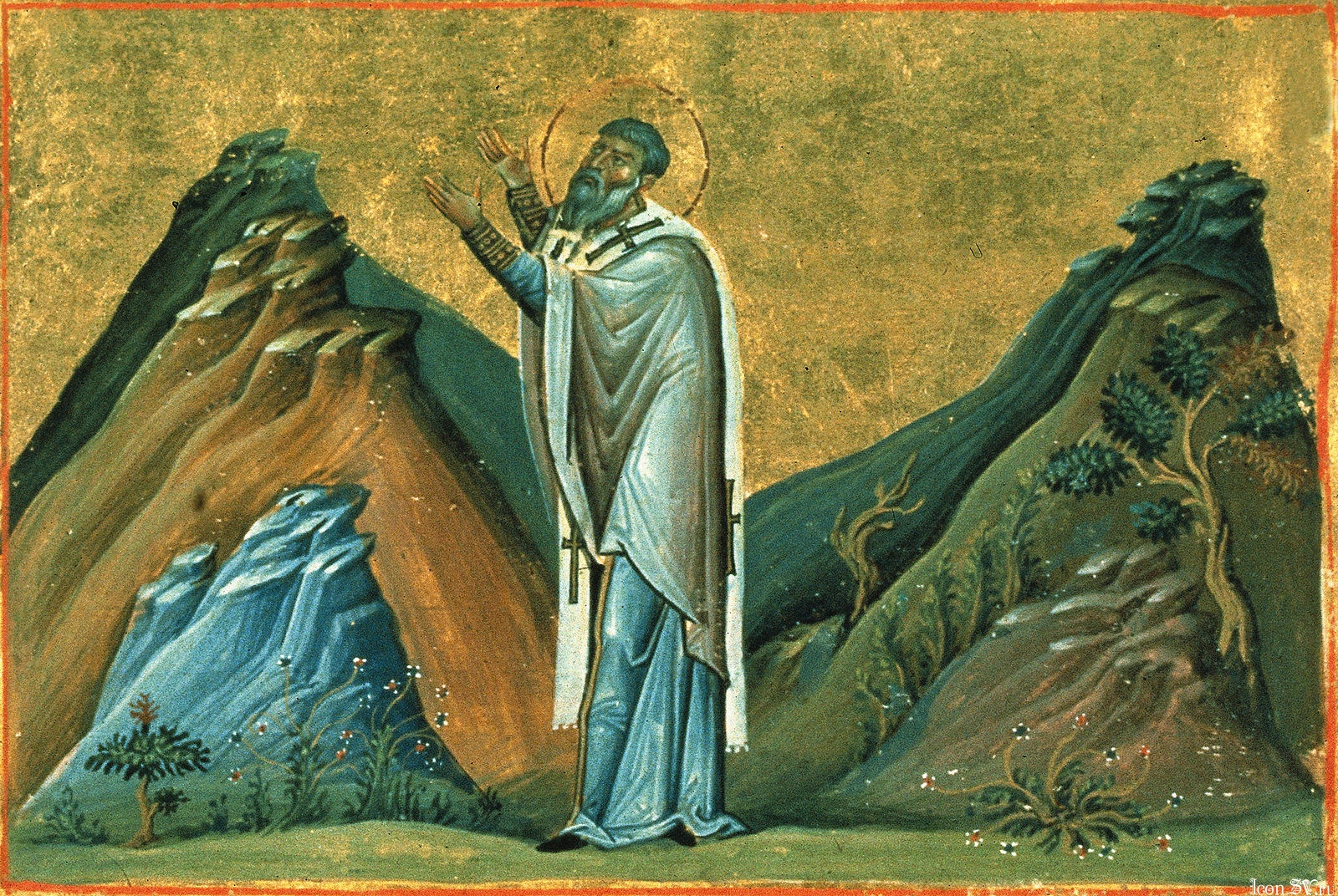 Святой равноапостольный Аверкий, епископ Иерапольский Константинополь. 985 г. Миниатюра Минология Василия II. Ватиканская библиотека. Рим.